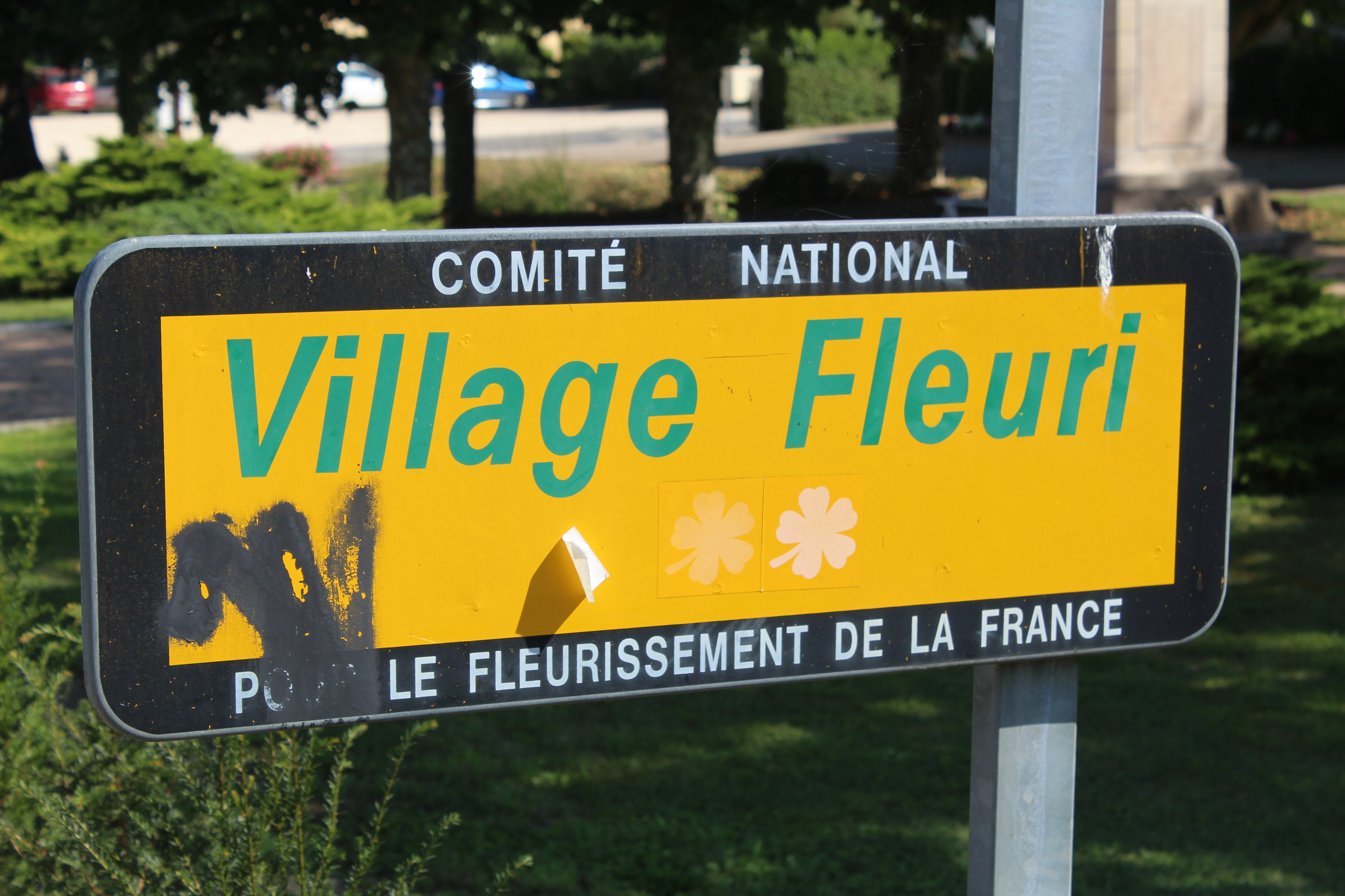 Panneau Village Fleuri avec 2 fleurs à Confrançon.